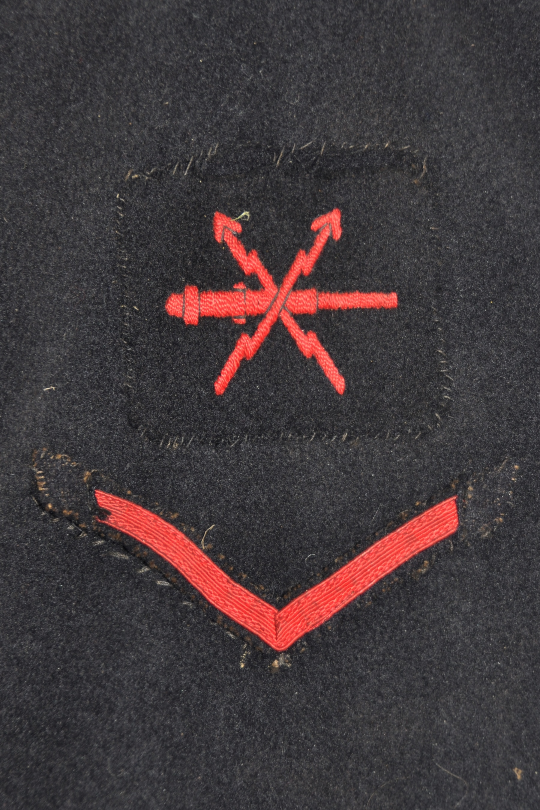 Military rank insignia of the Navy of the Netherlands: Matroos de 2e klasse.